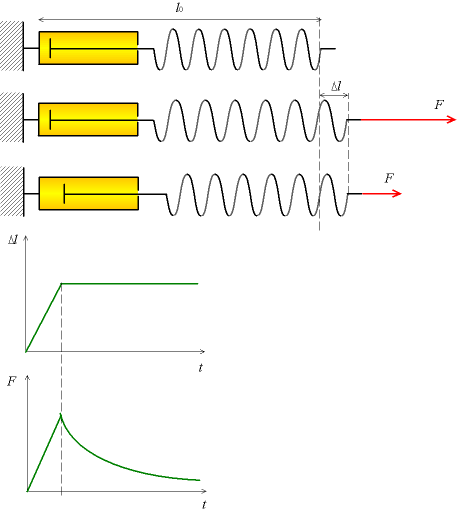 Modèle mécanique de la loi de comportement lors d’une relaxation de contrainte. Licence GFDL Christophe Dang Ngoc Chan